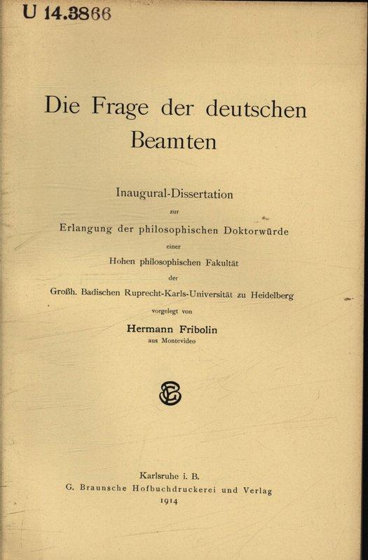 Hermann Fribolin Die Frage der deutschen Beamten 1914 Titel